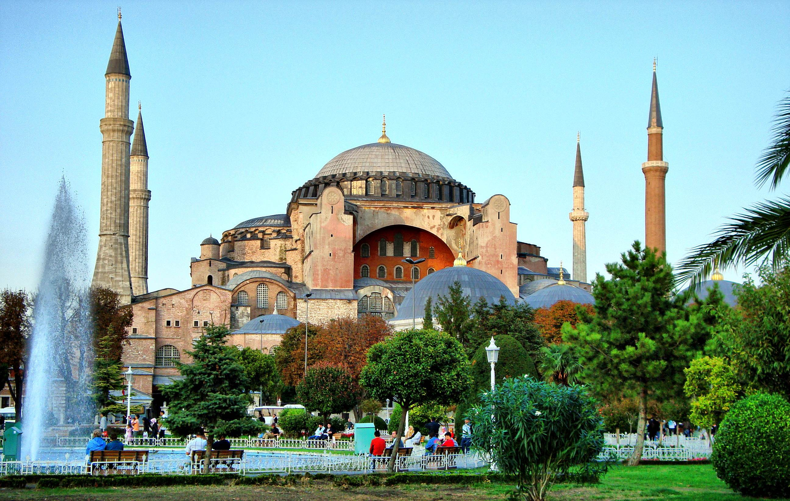 Hagia Sophia museum-İstanbul